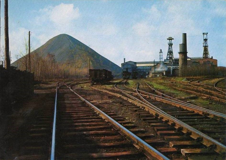 La fosse Sabatier de la Compagnie des mines d'Anzin était un charbonnage constitué de deux puits situé à Raismes, Nord, Nord-Pas-de-Calais, France.